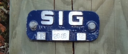 Poteau de ligne électrique aérienne, chemin Charles-Georg, Petit-Saconnex, Genève. Plaque des Services industriels de Genève indiquant l'année : 2013.